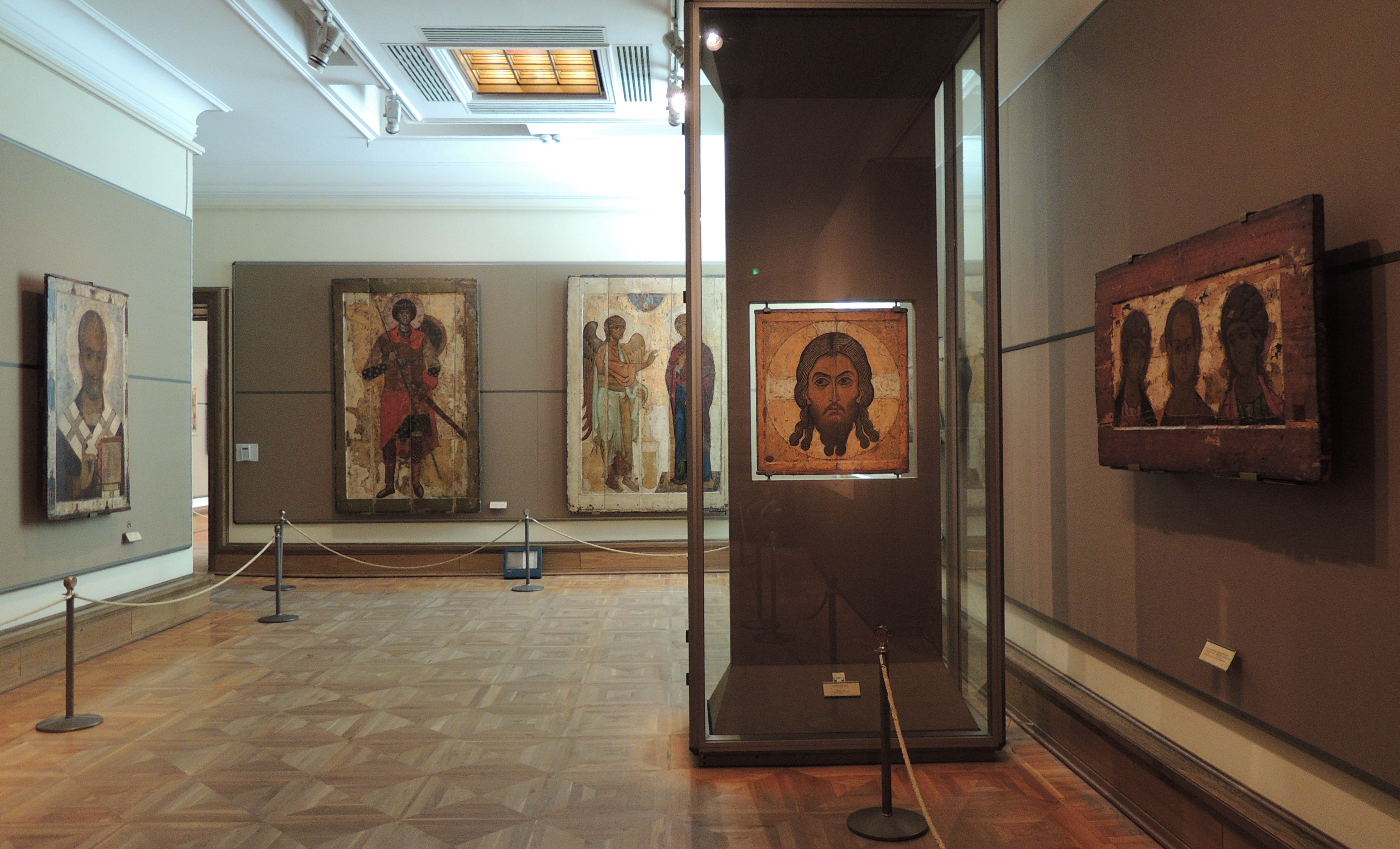 Интерьер ГТГ